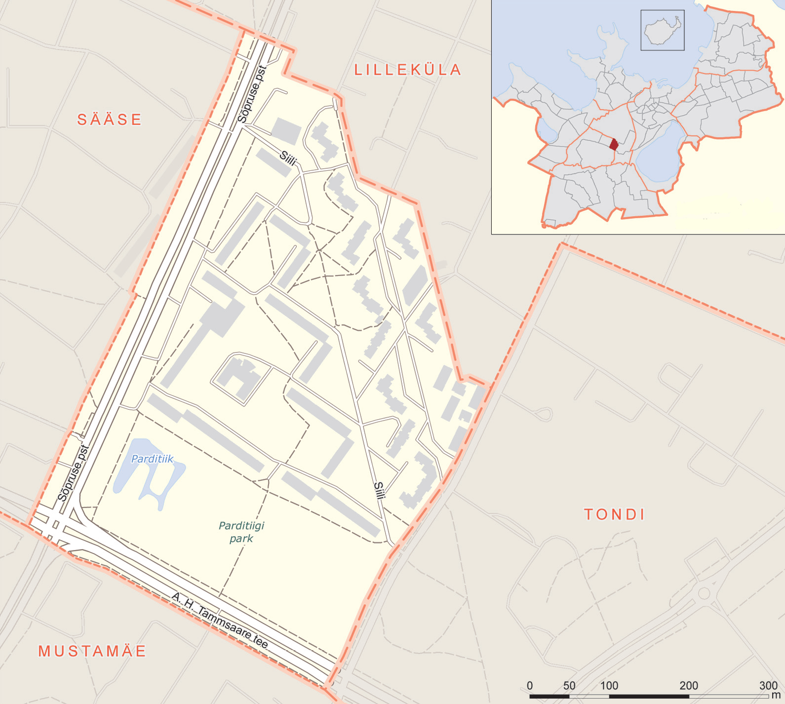 Siili asumi kaart